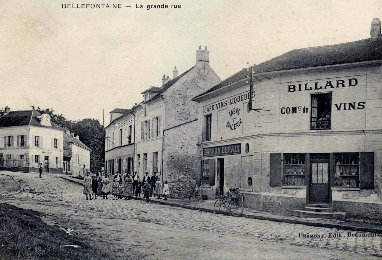 Bellefontaine (Val-d'Oise; France) - La Grande Rue vers 1900.